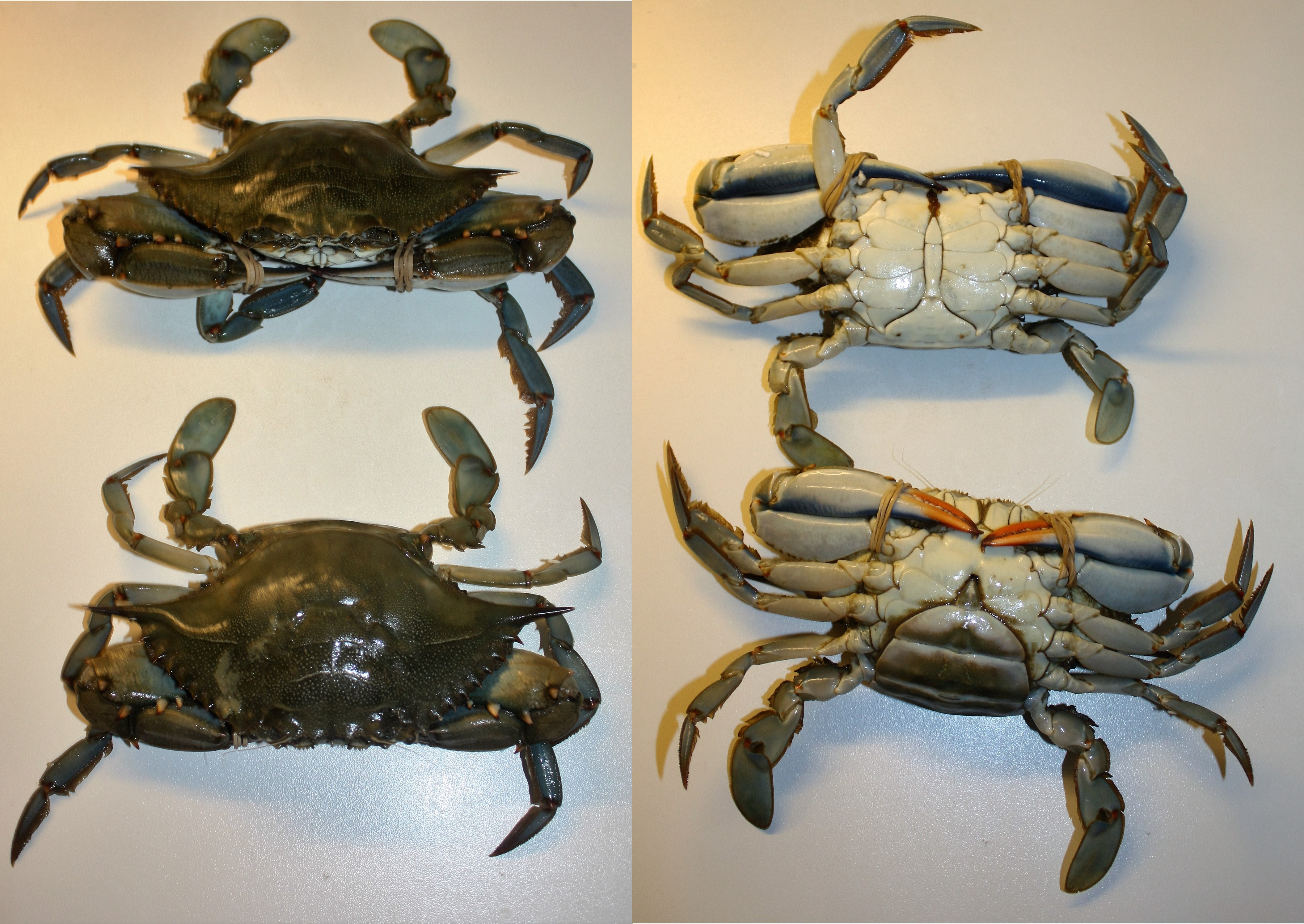 Unterschied zwischen Männchen (oben) und Weibchen bei zwei Schwimmkrabben.